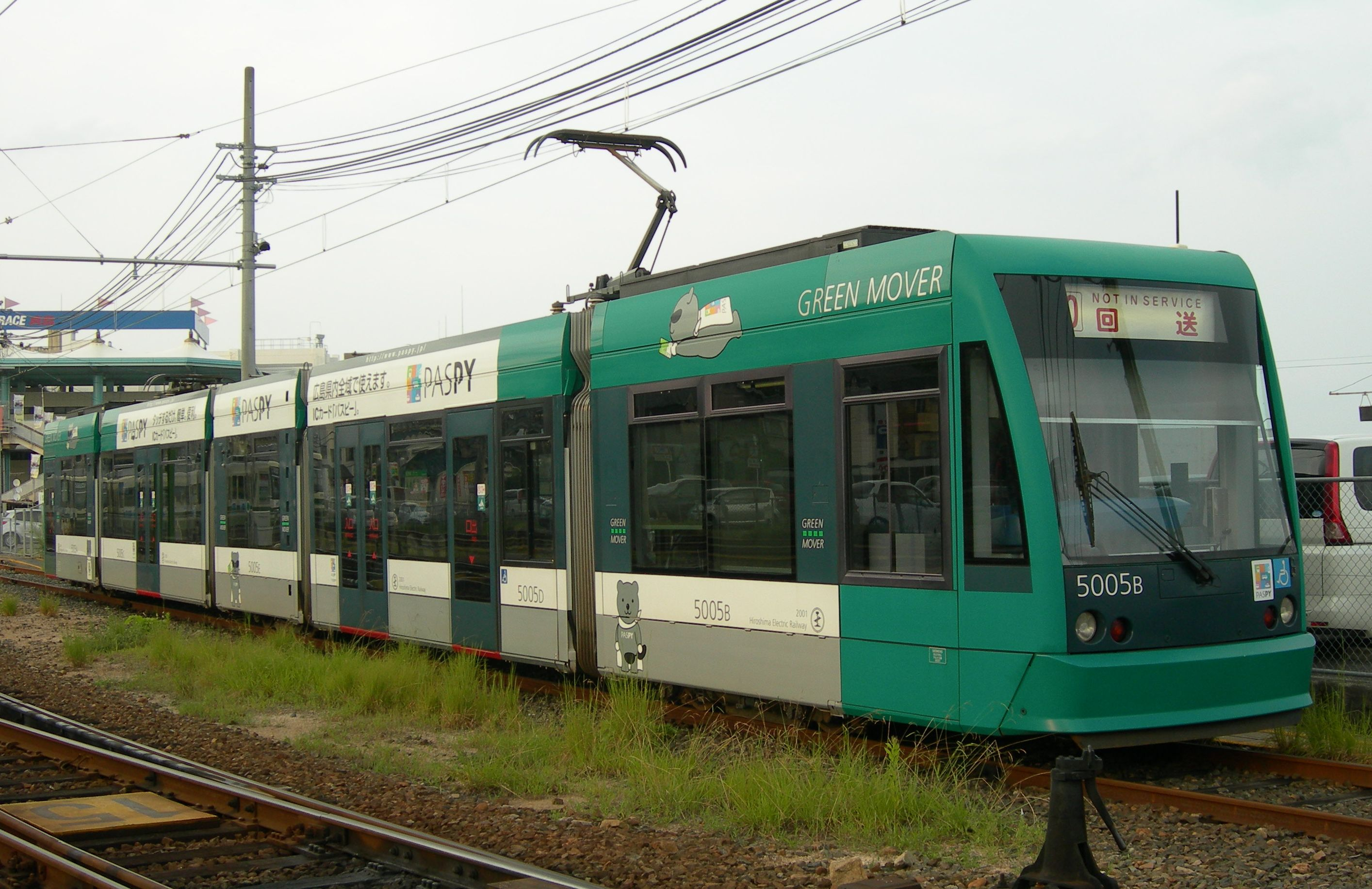 広島電鉄5000形路面電車